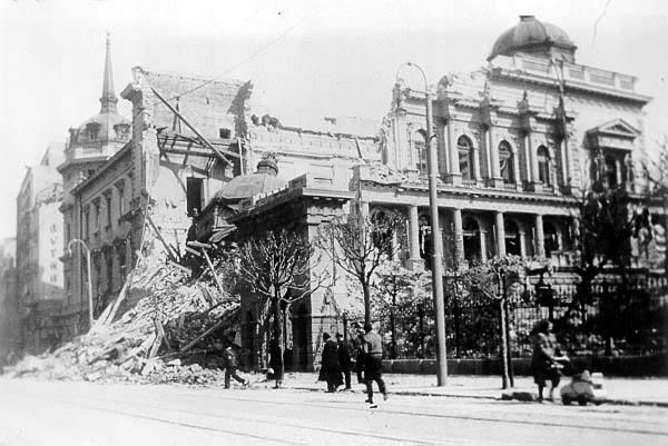 Фотографије бомбардованог Београда 06. 04. 1941. и улазак окупатора у Београд априла 1941.